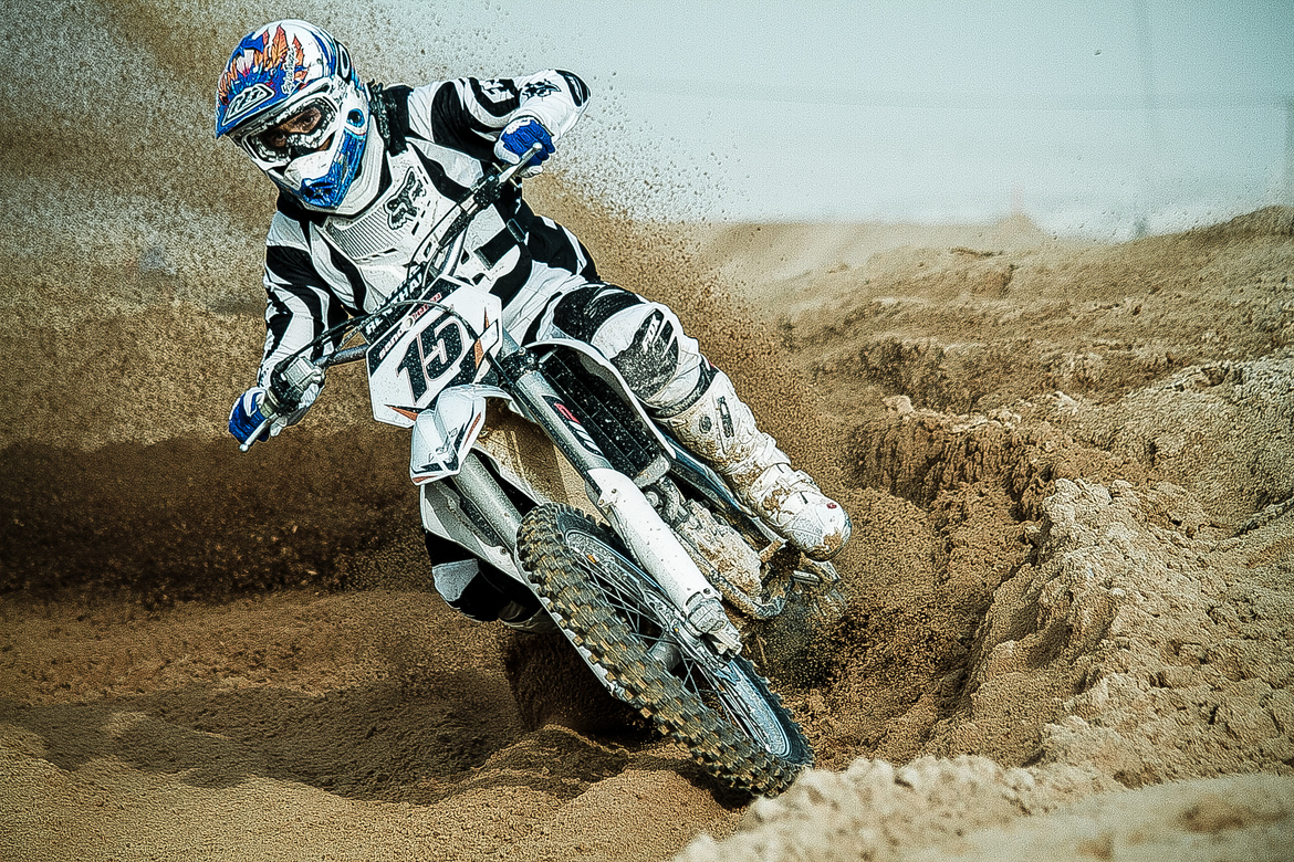 Motocrossista a Dubai.